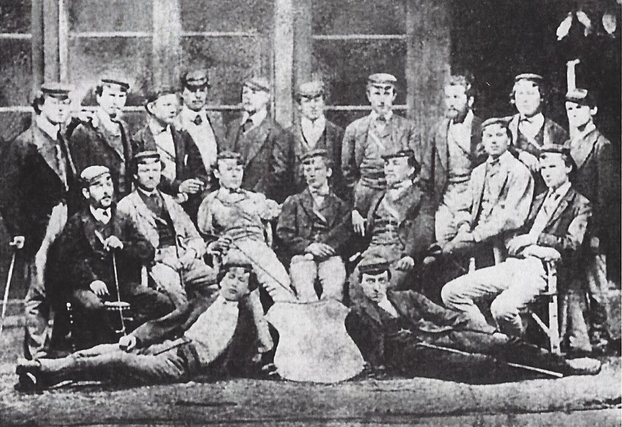 Wiener akademische Burschenschaft Teutonia mit Karl Emil Franzos